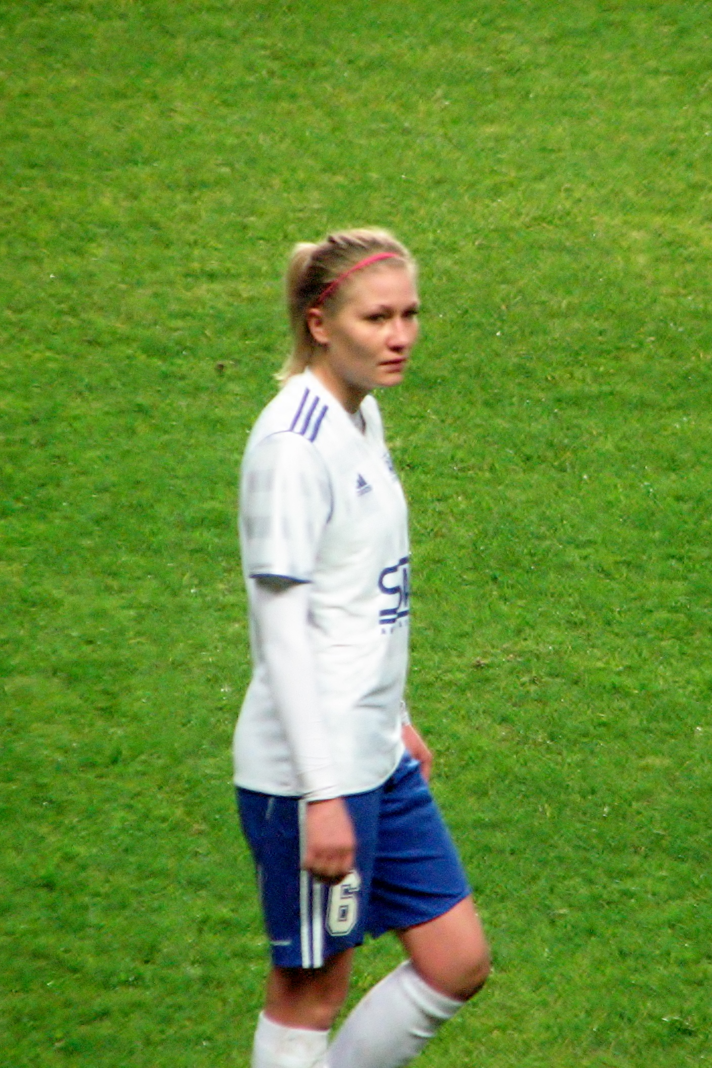 Anete Paulus mängimas Pärnu JK ridades VfL Wolfsburgi vastu